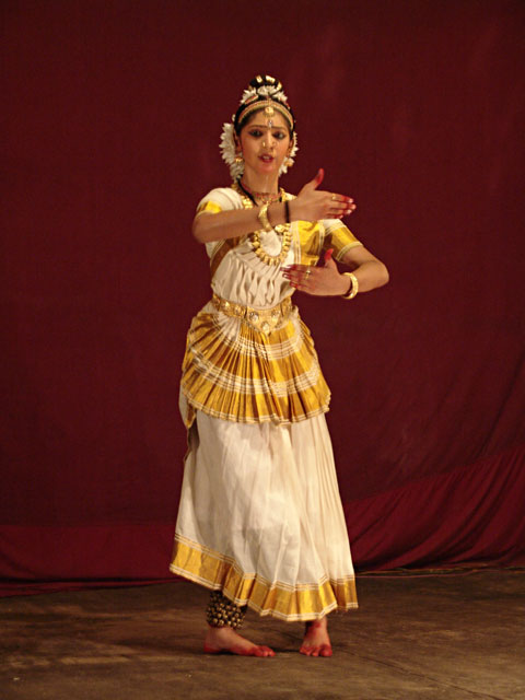 Unidentified scene in Kerala India